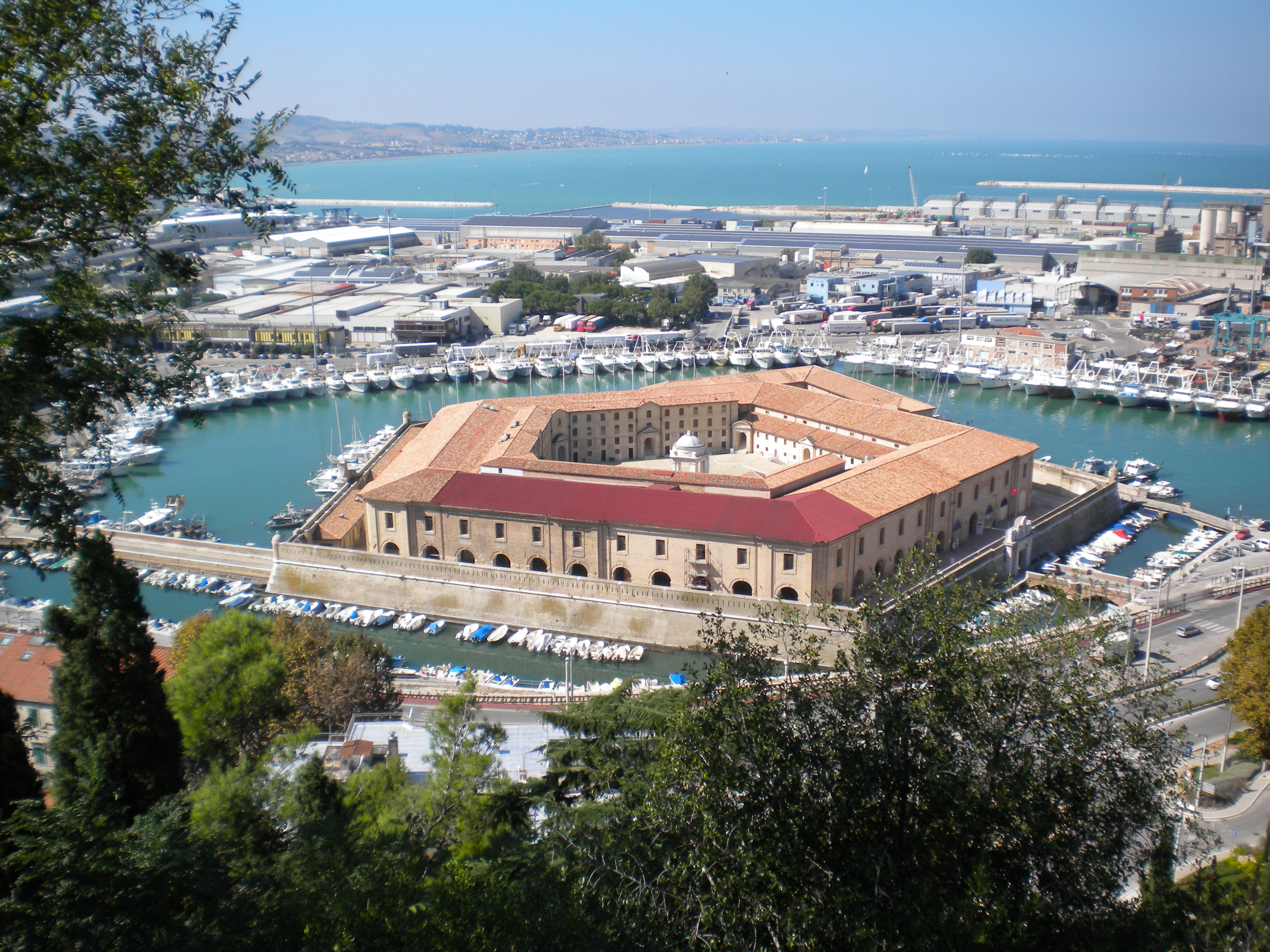 Mole Vanvitelliana This is a photo of a monument which is part of cultural heritage of Italy.